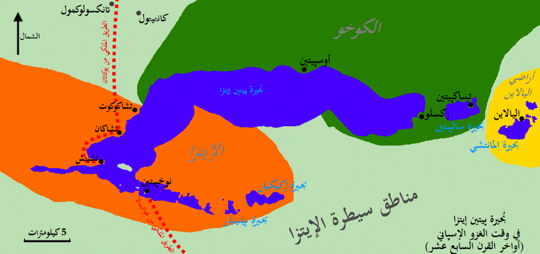 بُحيرة پيتين إيتزا، في غواتيمالا، في وقت في وقت الغزو الإسپاني سنة 1697م.